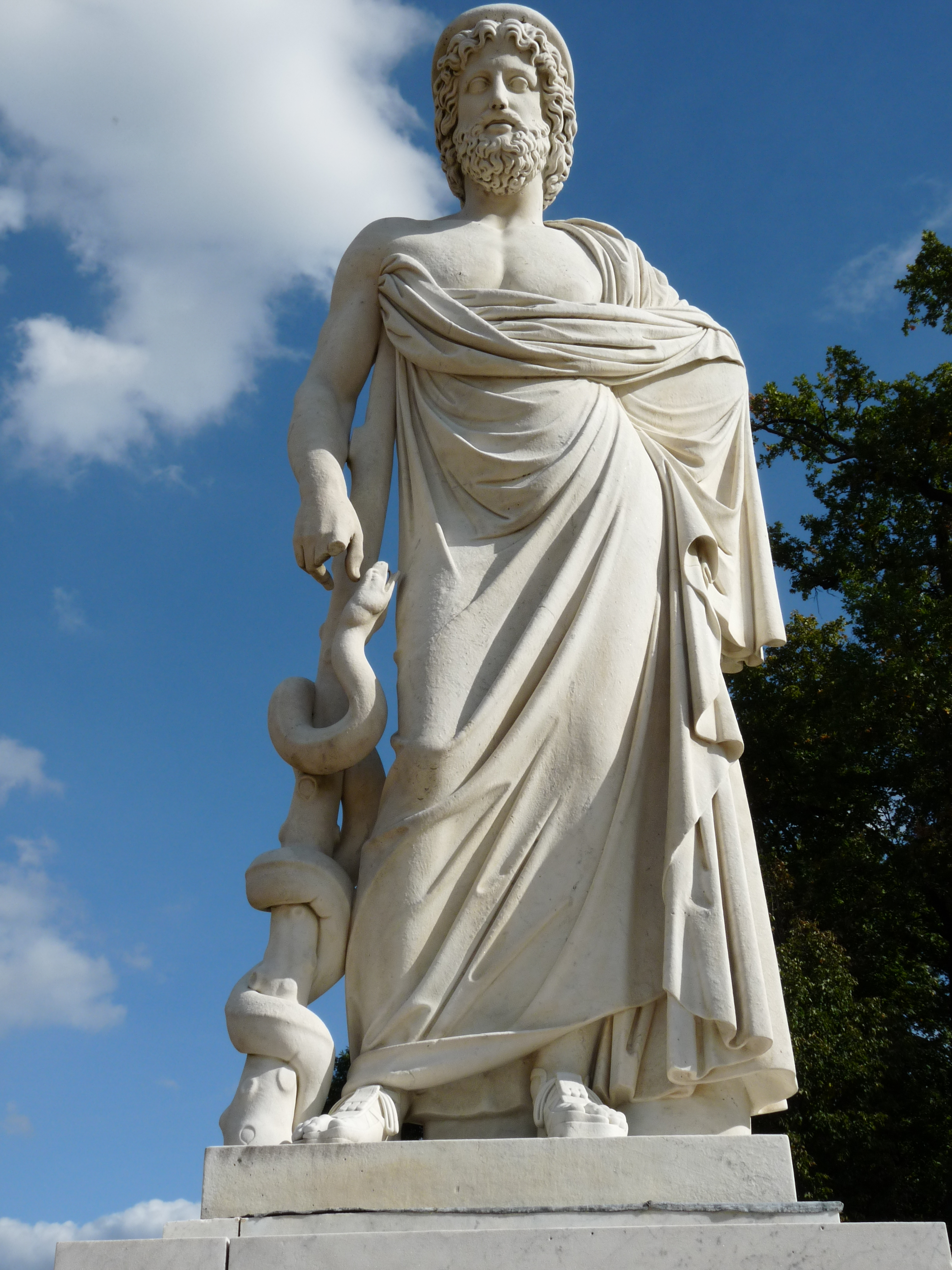 Äskulap bzw. Asklepios mit Schlangenstab - Halbrondell Neues Palais Sanssouci